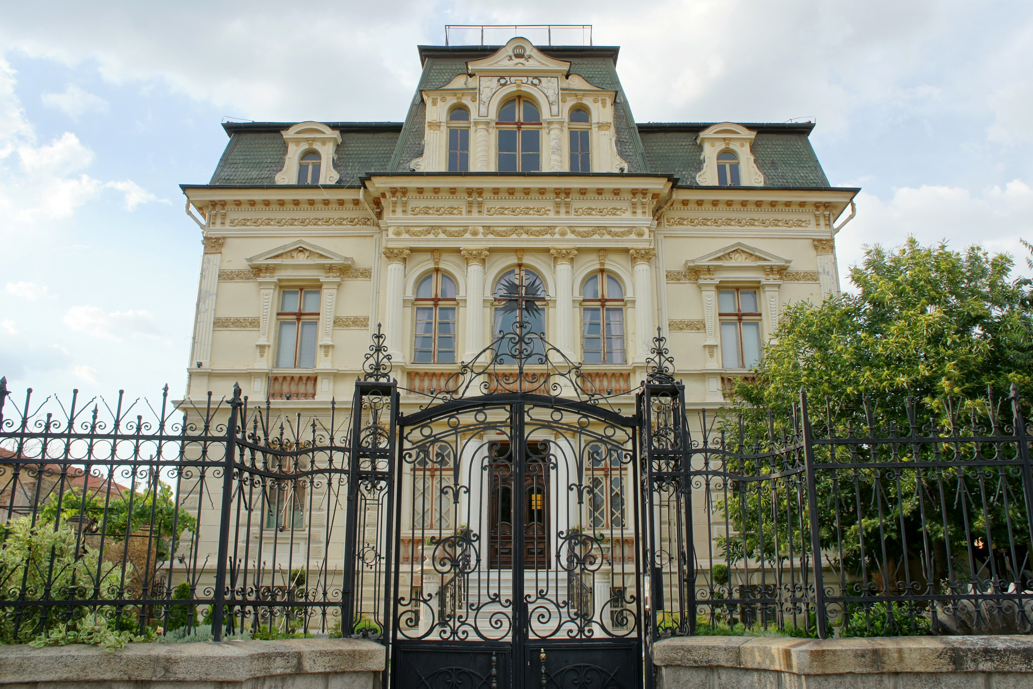 Црковното седиште на Преспанско-пелагониската православна епархија се наоѓа во градот Битола